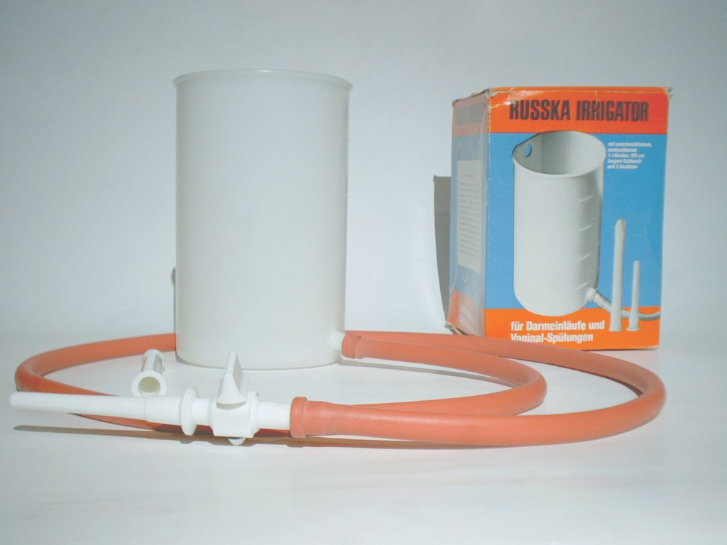 Irrigator für Einläufe und Vaginalspülungen